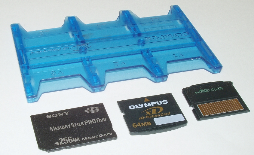 Memorijske kartice sa spremnikom za nekoliko kartica